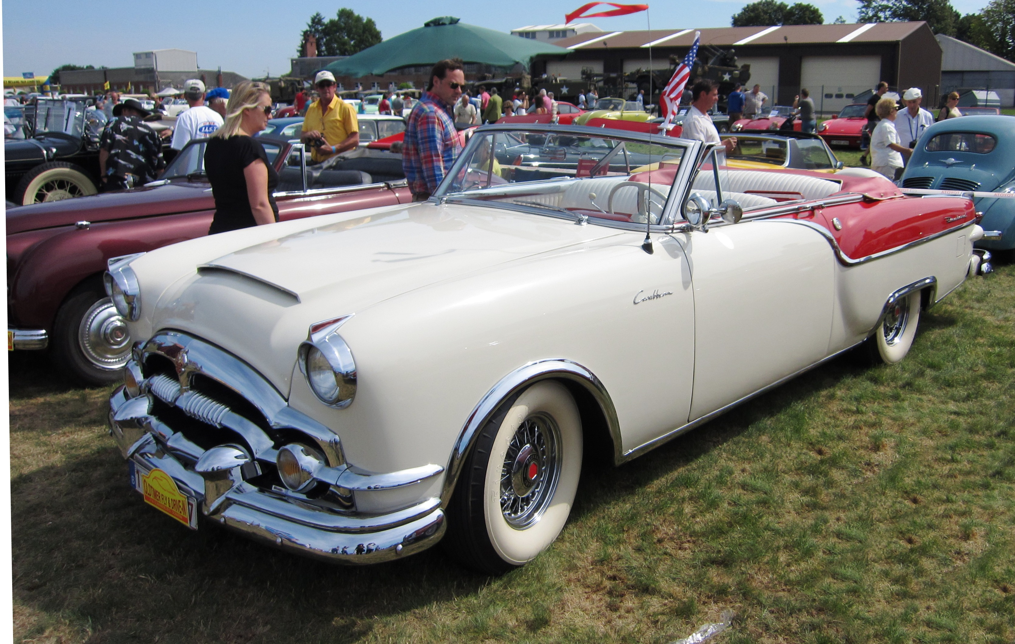 Packard Caribbean cabriolet 1954